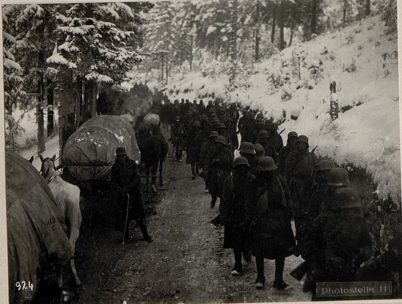 Friccastraße. Truppentransport.